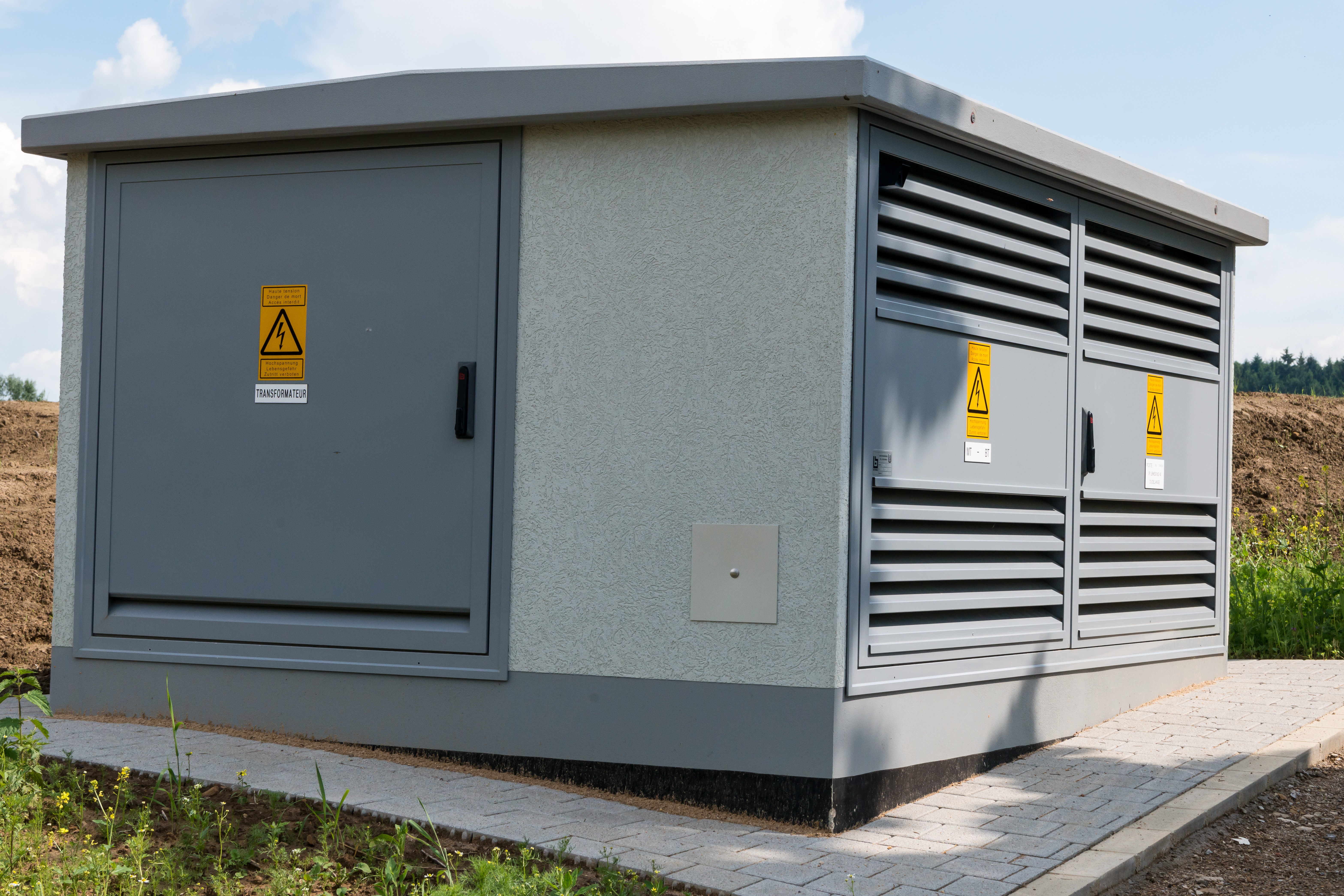 «Op Lenkeschlei» zu Diddeleng.